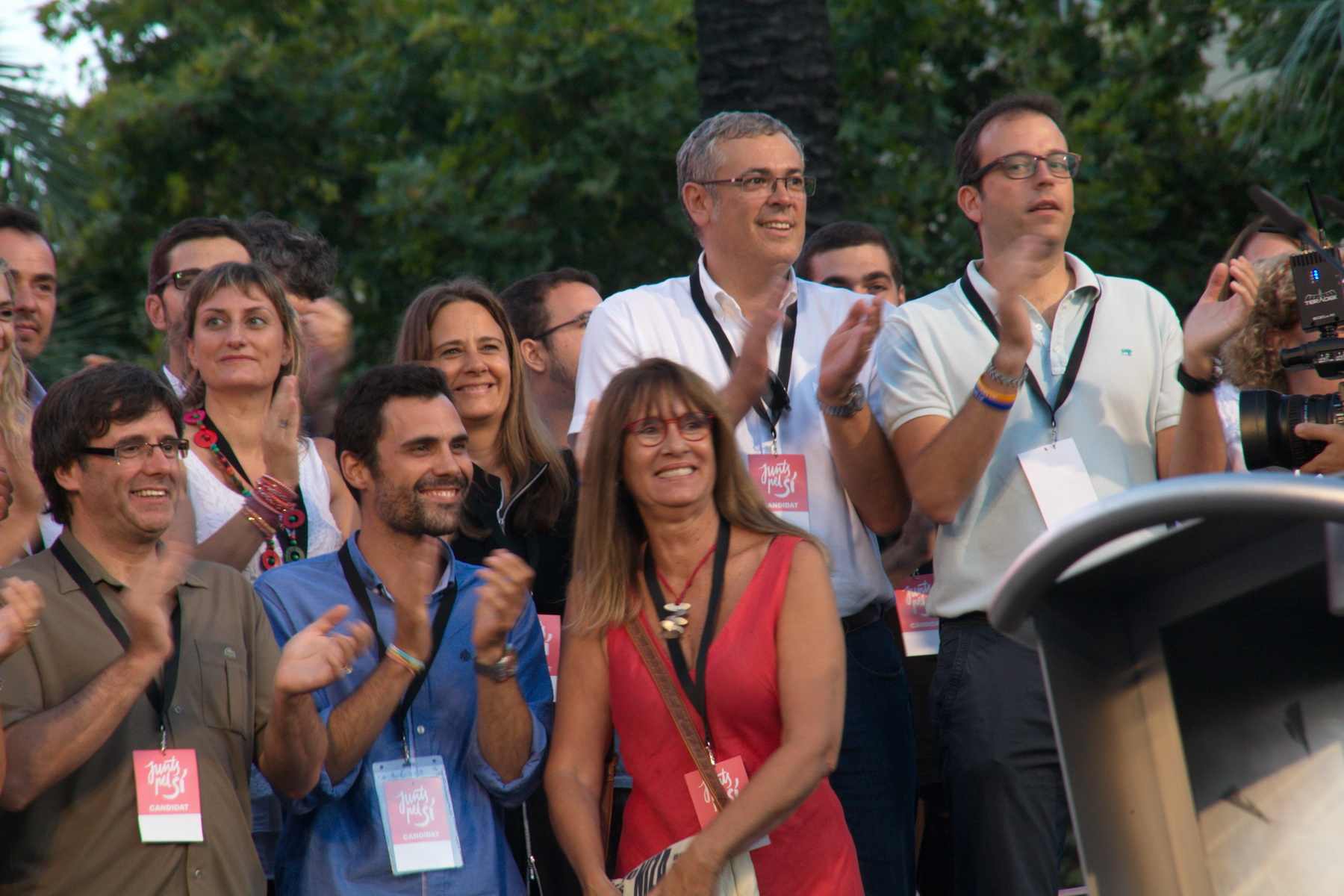 Acte de presentació de tots els candidats de la llista Junts pel Sí a Barcelona, al Psg.Lluís Companys. (28-8-2015)